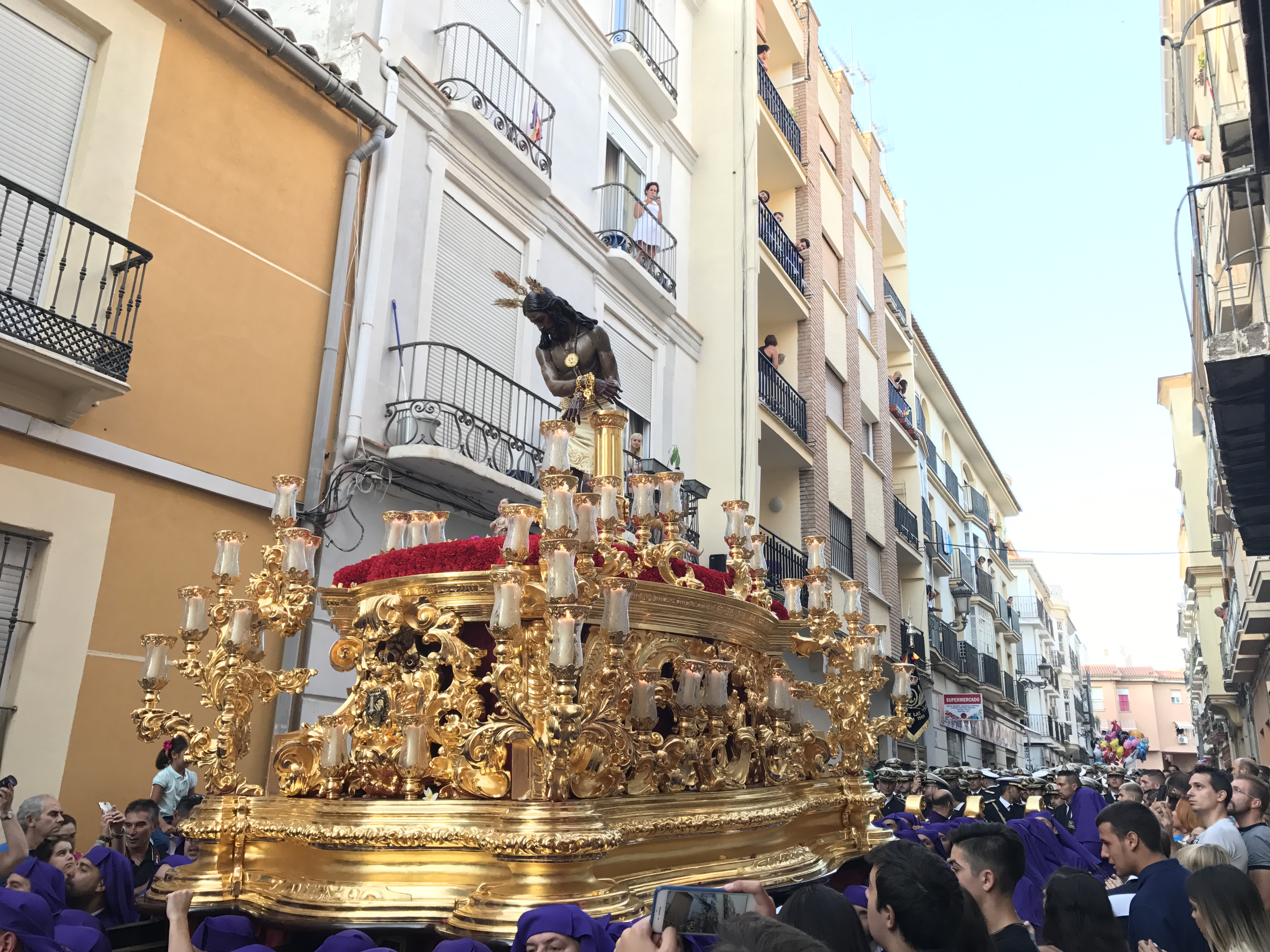 Señor de la Columna realizada por Juan Vargas Cortés, para la Cofradía de Gitanos (Málaga)